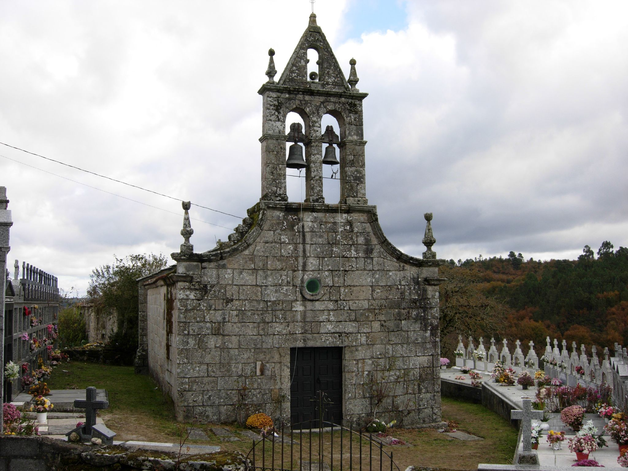 Igrexa de Santa Baia de Búbal, Carballedo, Galiza. Igrexa románica contruída a principios do século XIII, da que soamente se conserva a ábsidae de planta rectangular.